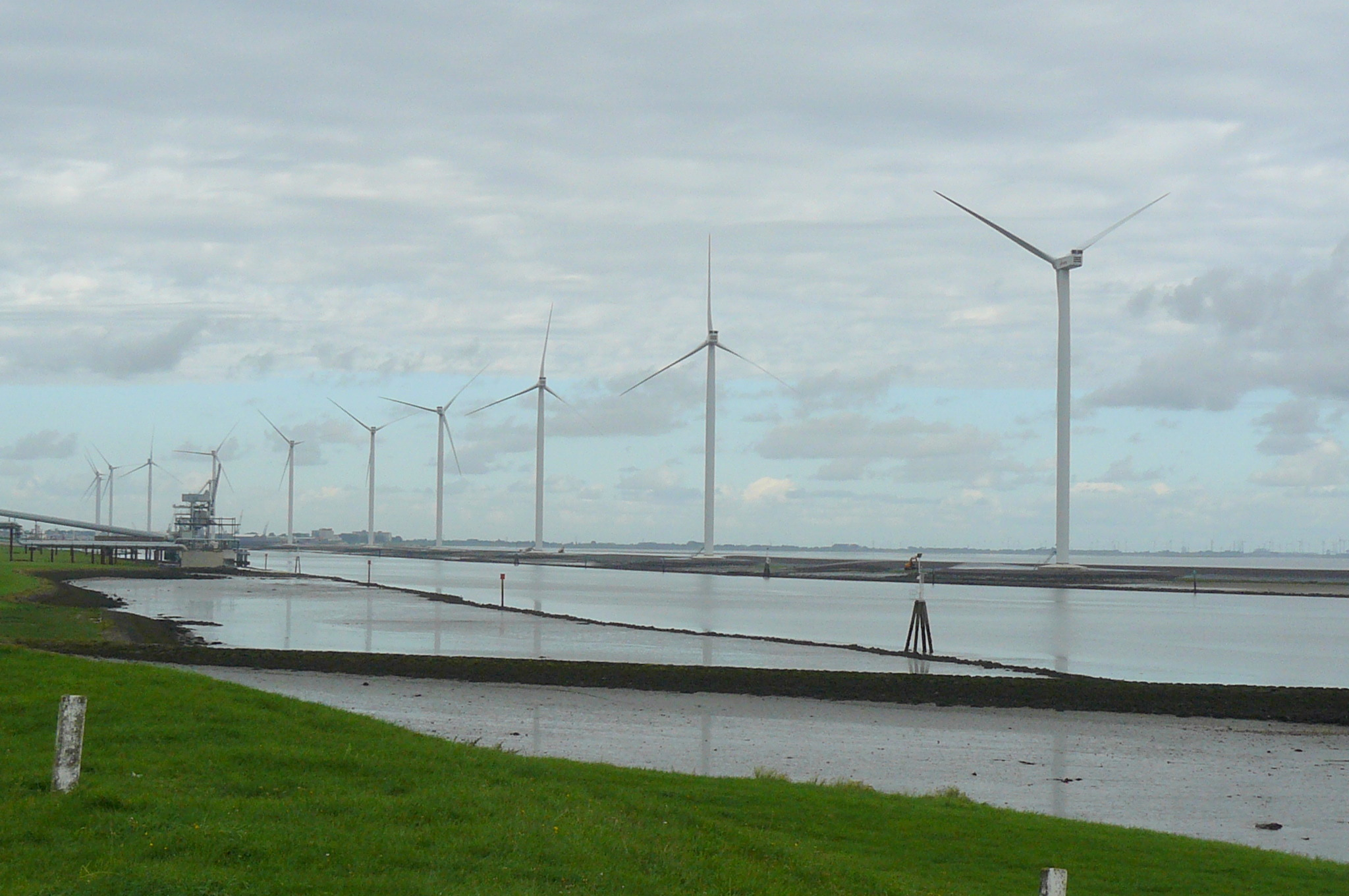 Rij met windmolens op de Schermdijk.